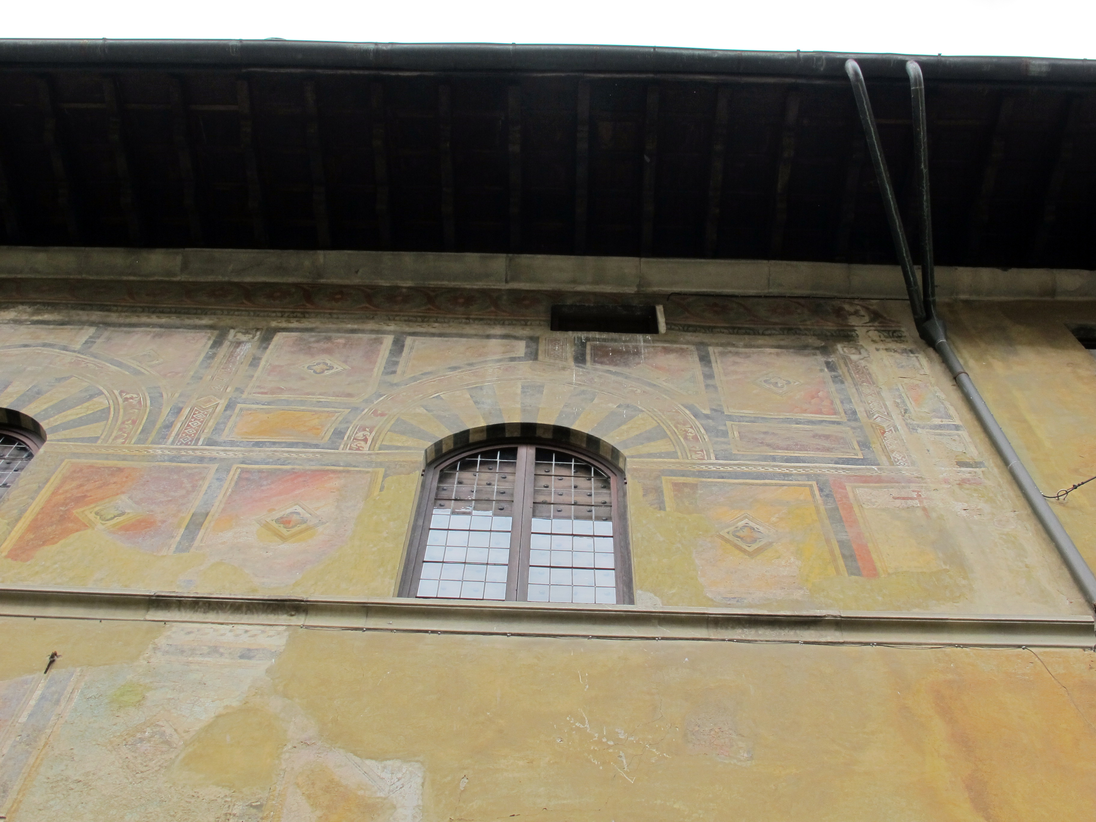 Palazzo Datini, Prato